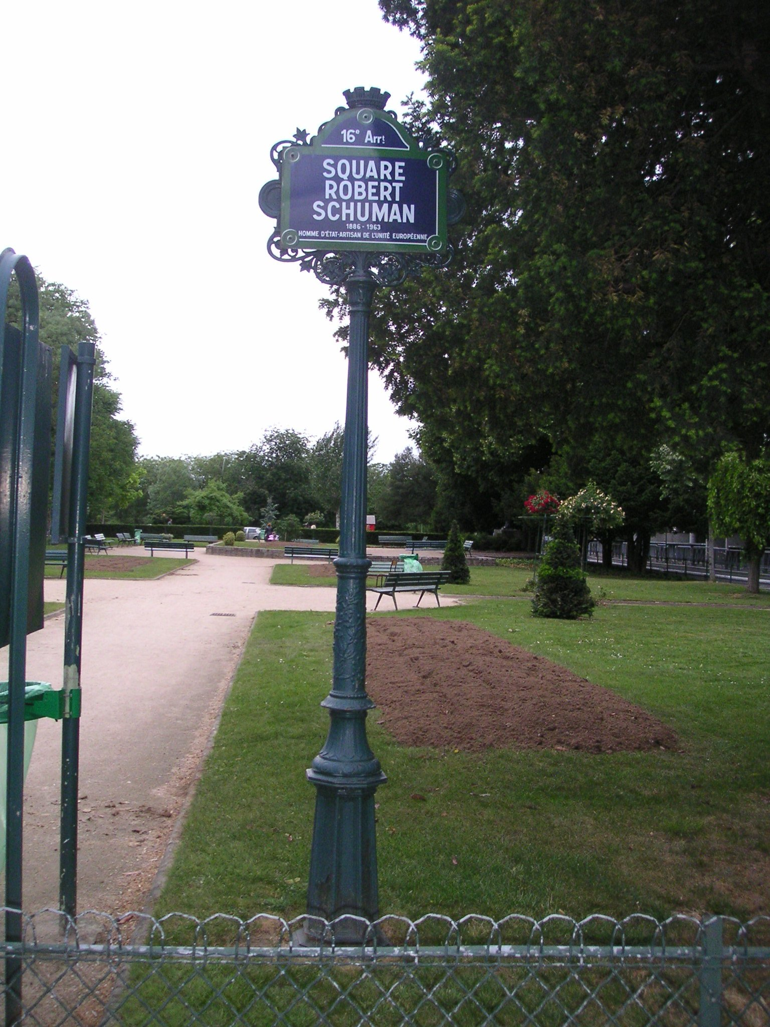 Square Robert Schuman, Paris